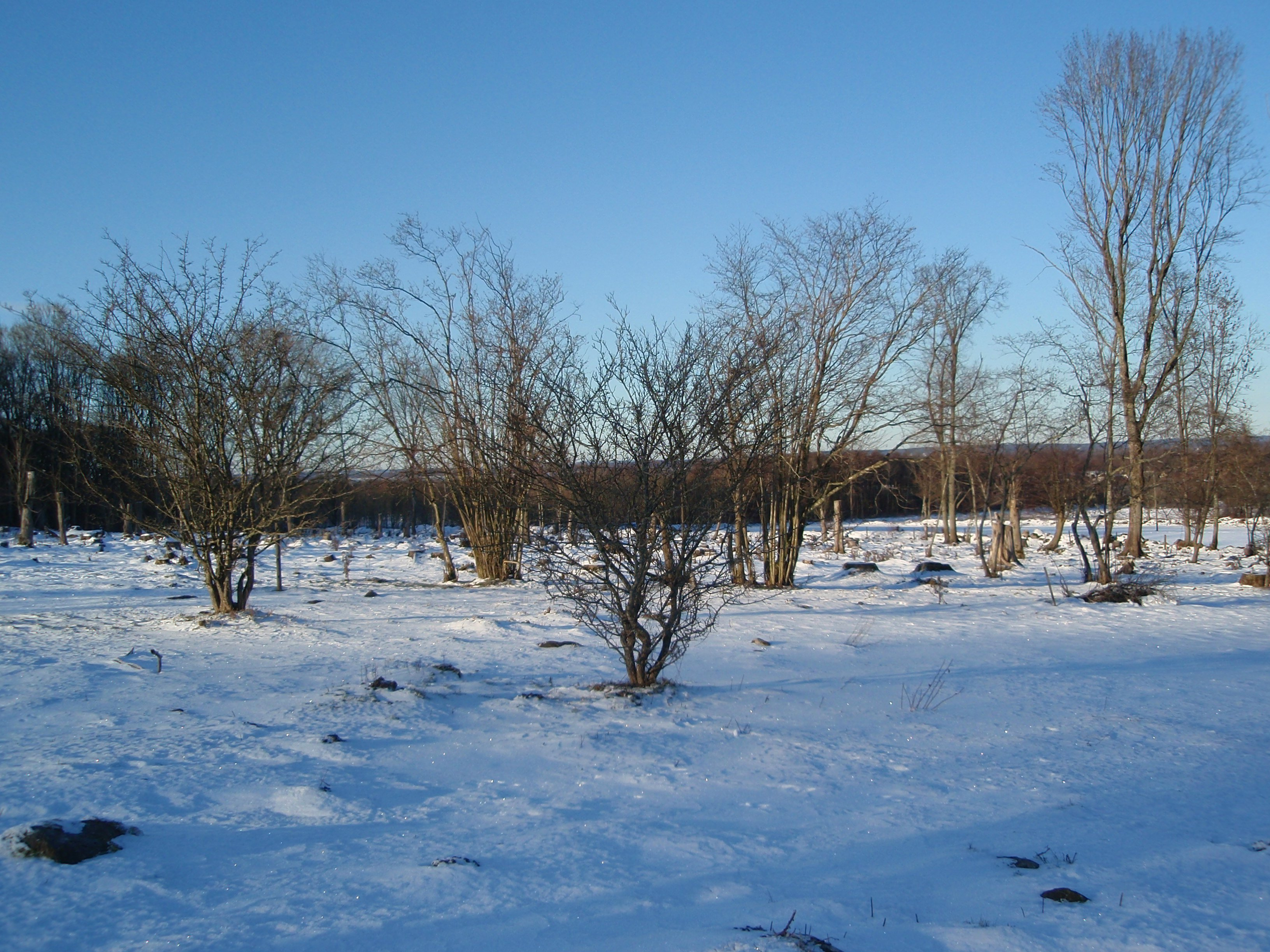 Stubbskottängen på vintern